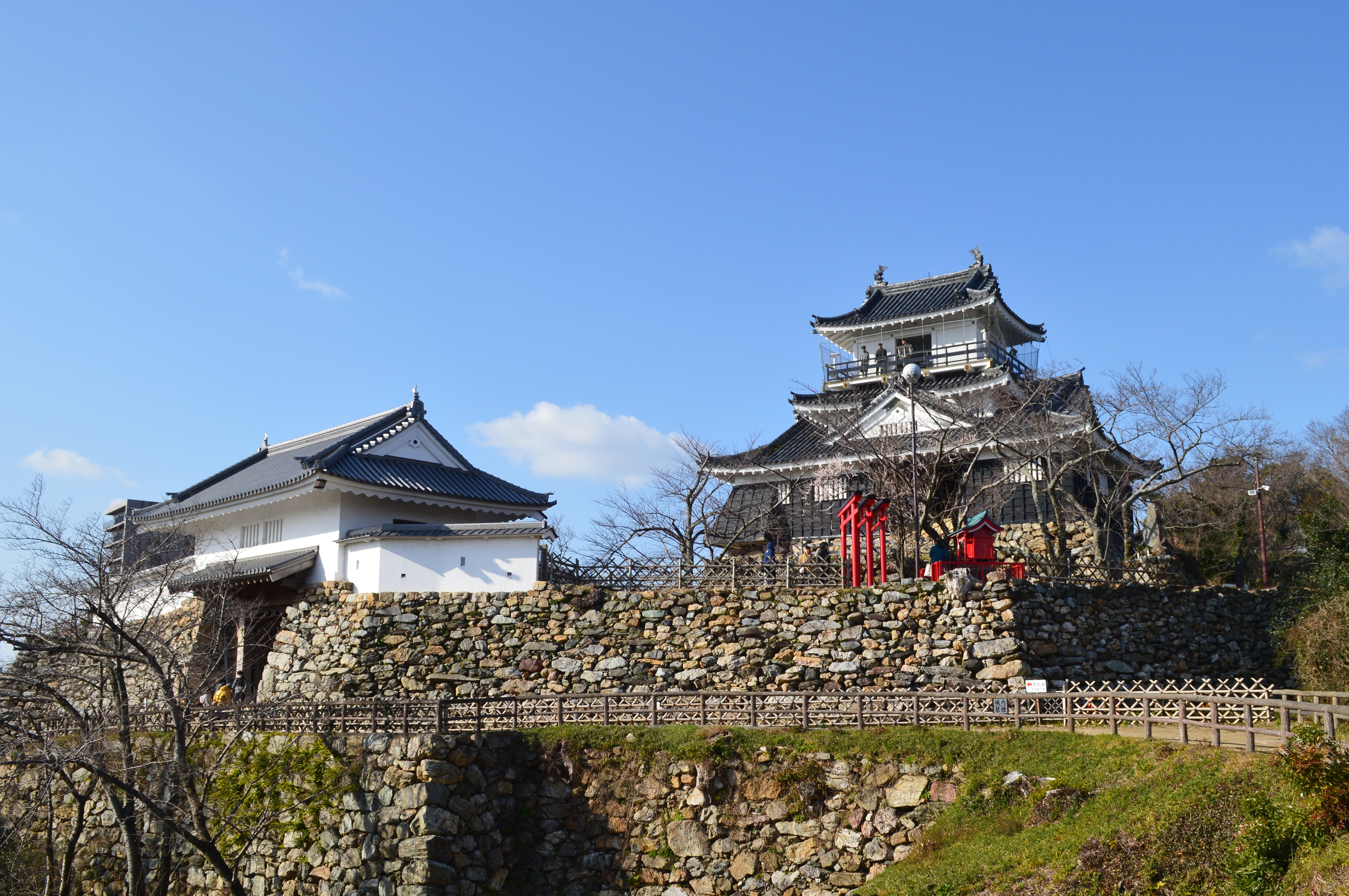 浜松城 模擬天守・天守門（復元）